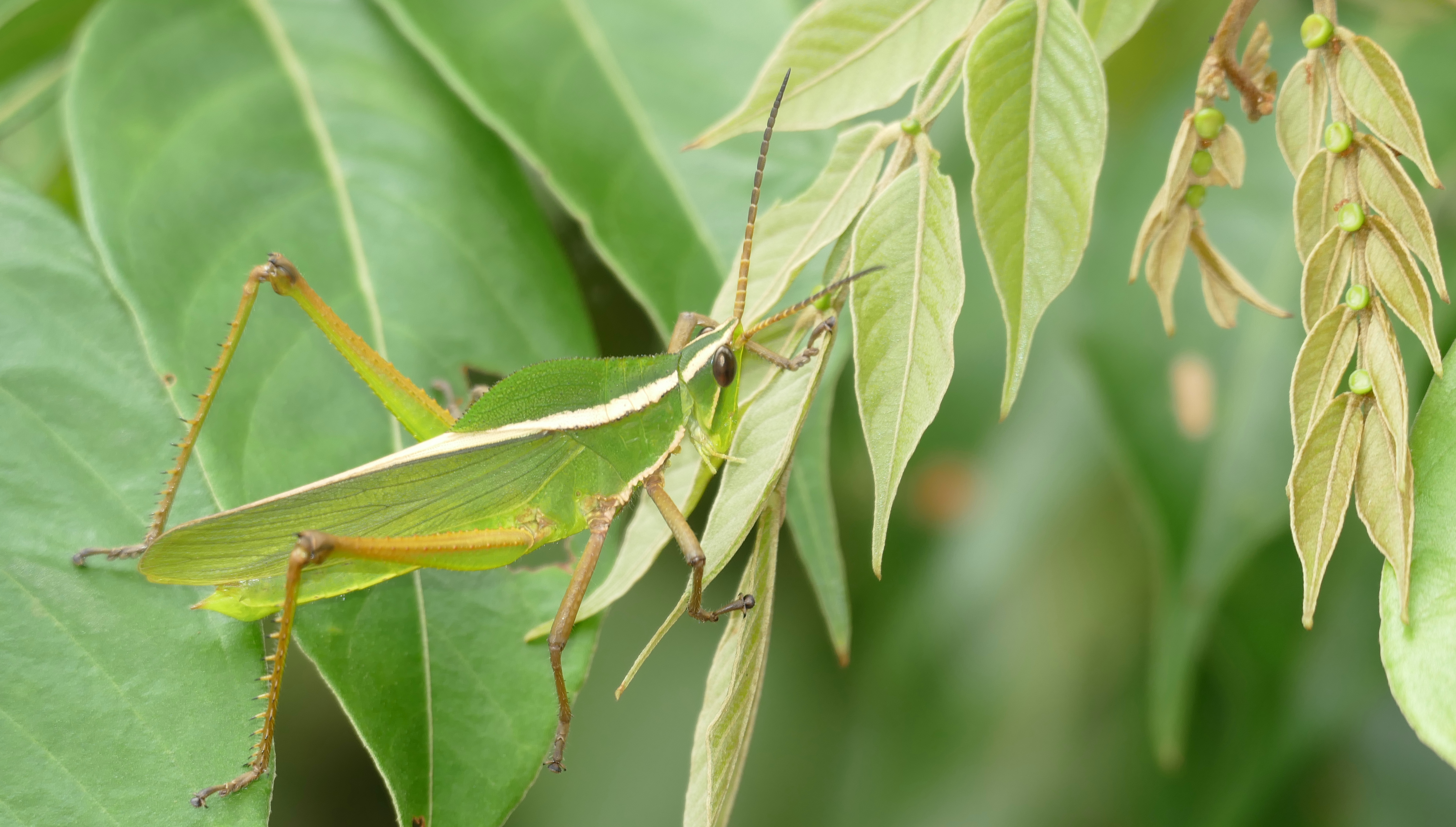 Piste de Fourgassié, Montagne de Kaw, Roura, French Guyana, FRANCE